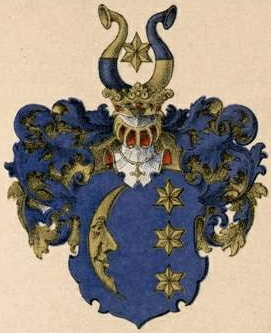 Zeddelmanni suguvõsa aadlivapp